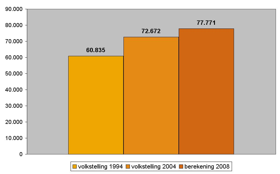 Evolution population Khénifra, Morocco